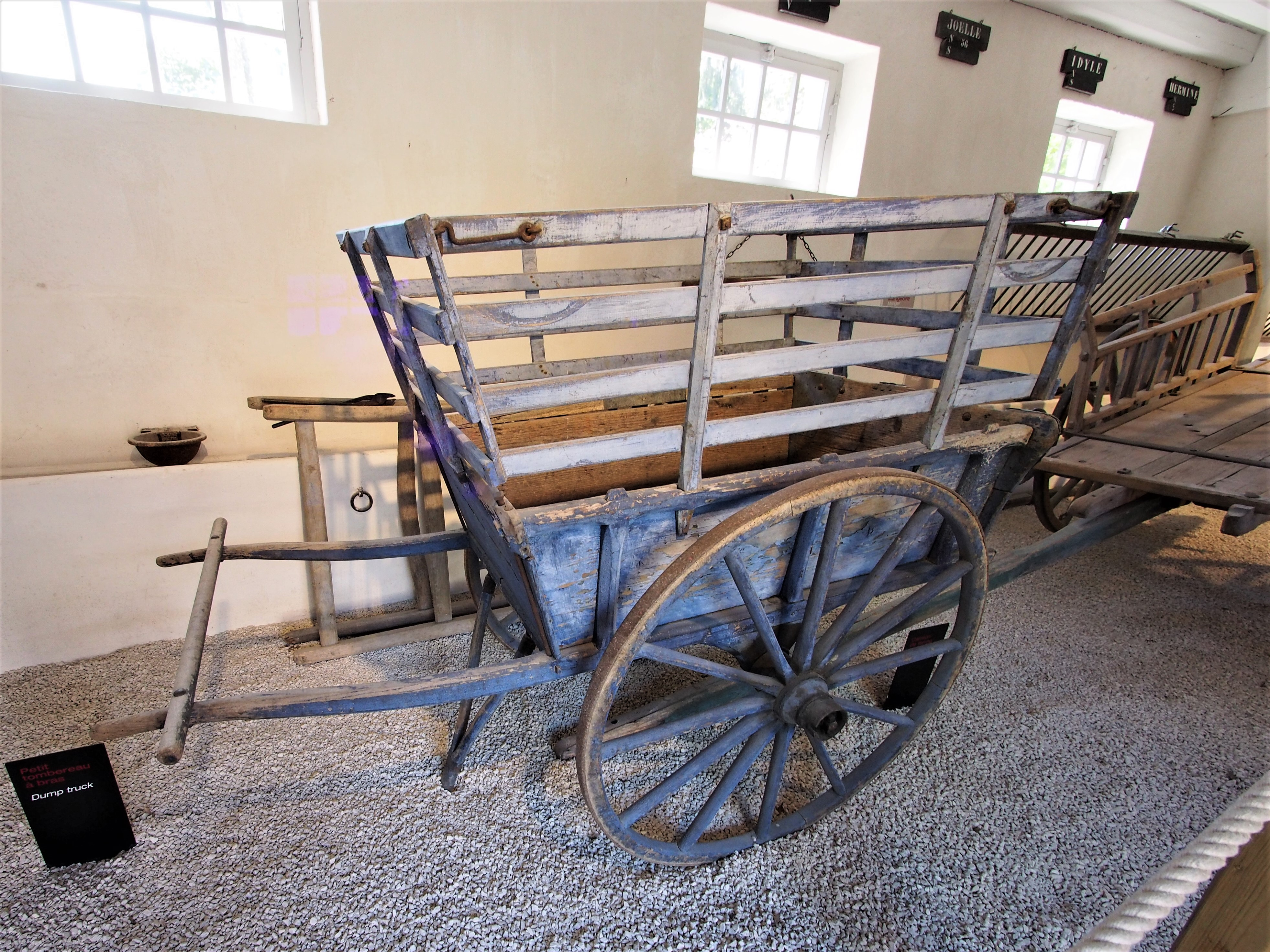 Photographed at Château de Chenonceau, France.